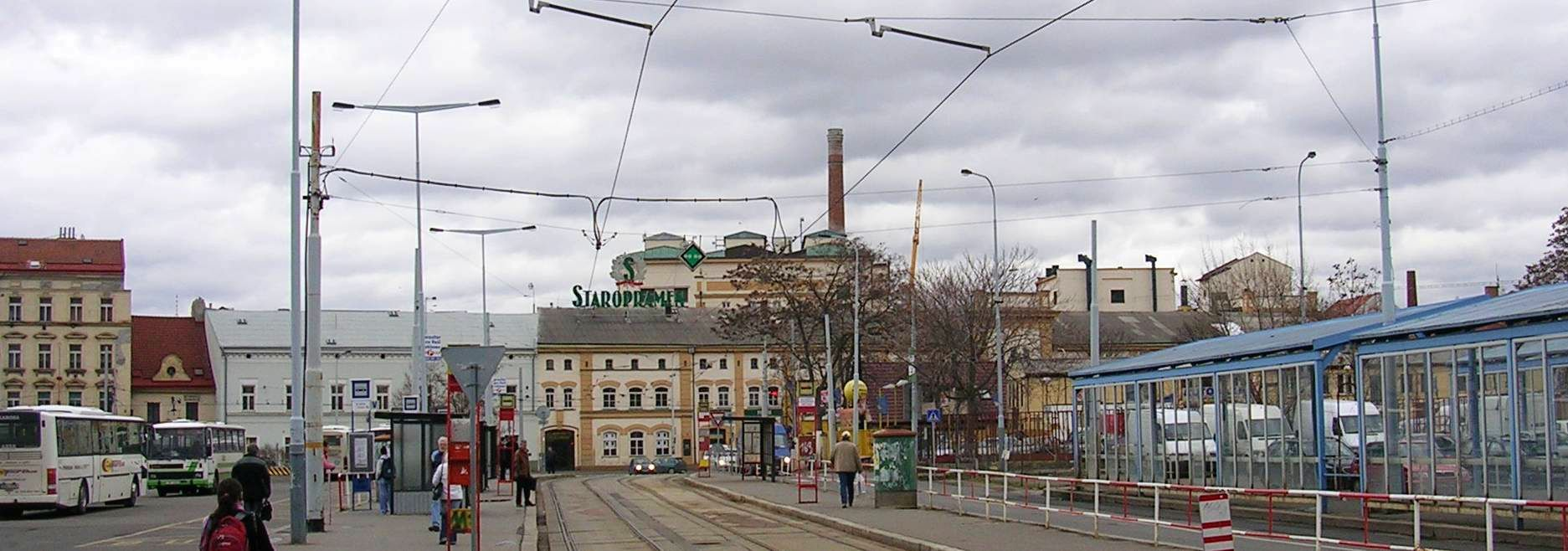 Praha, Smíchov, pivovar Staropramen - Google Maps - Google Earth